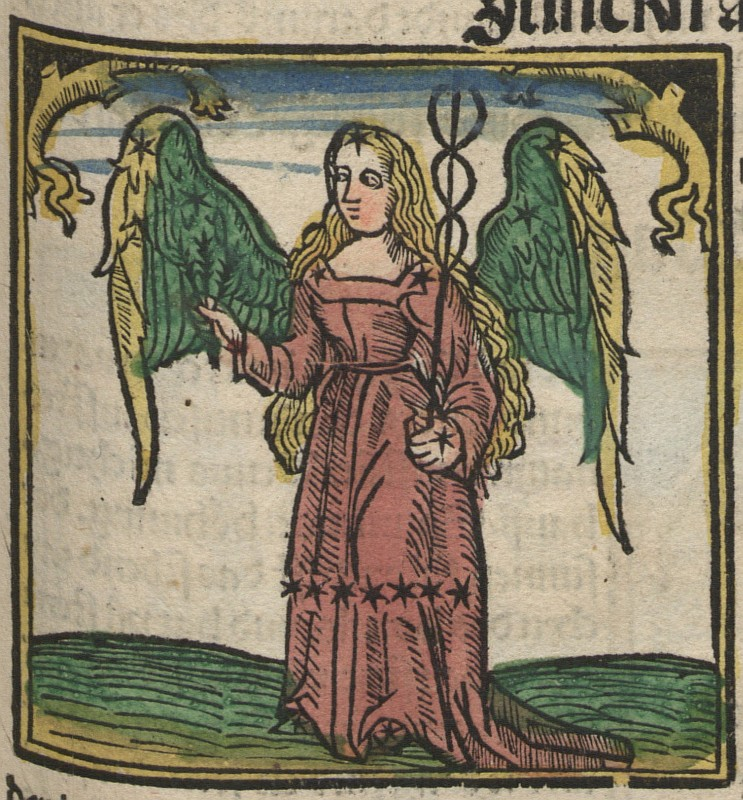 Original image description from the Deutsche Fotothek Astrologie & Sternzeichen & Kalender